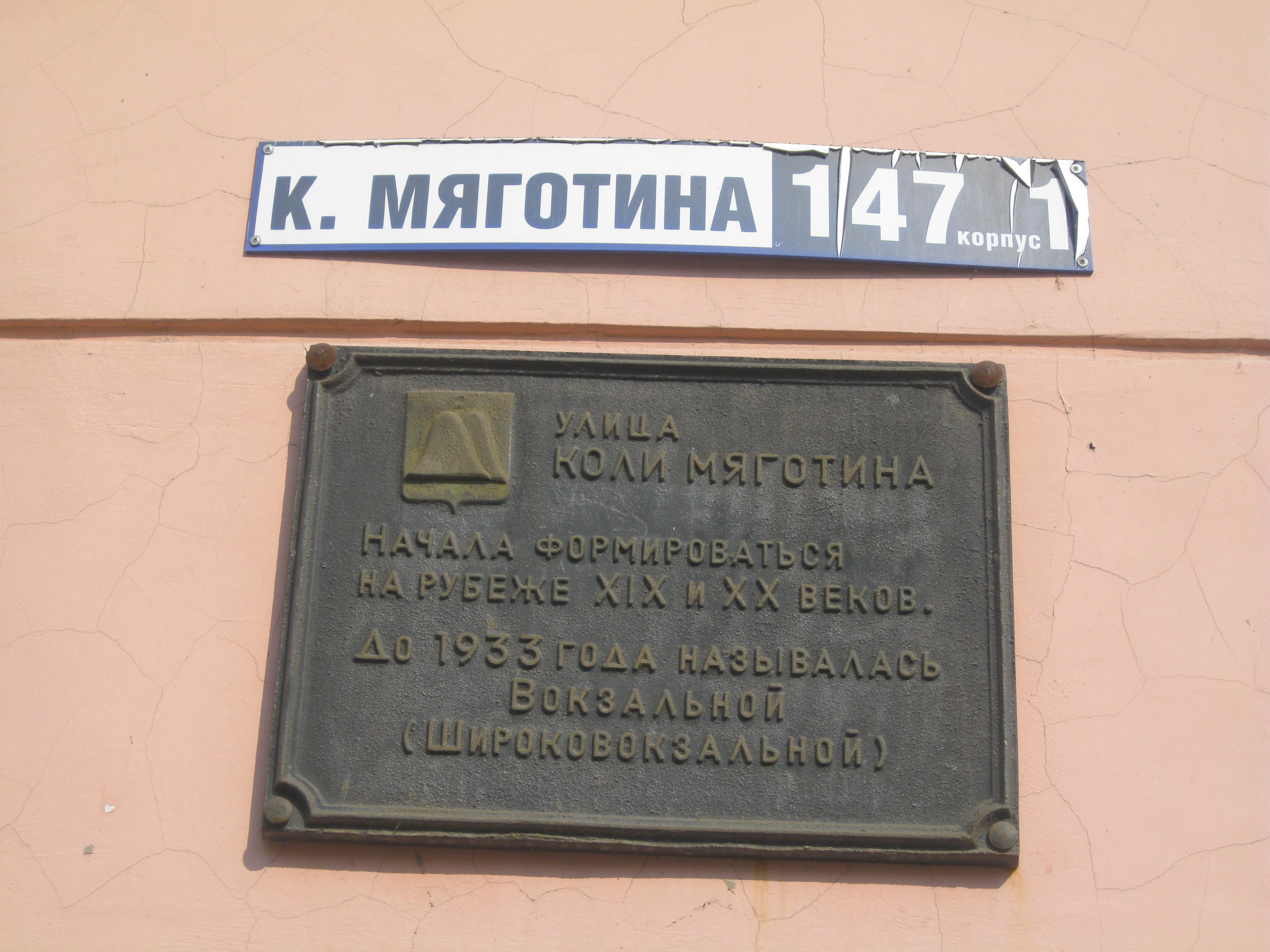 Мемориальная доска на улице Коли Мяготина в Кургане, Россия